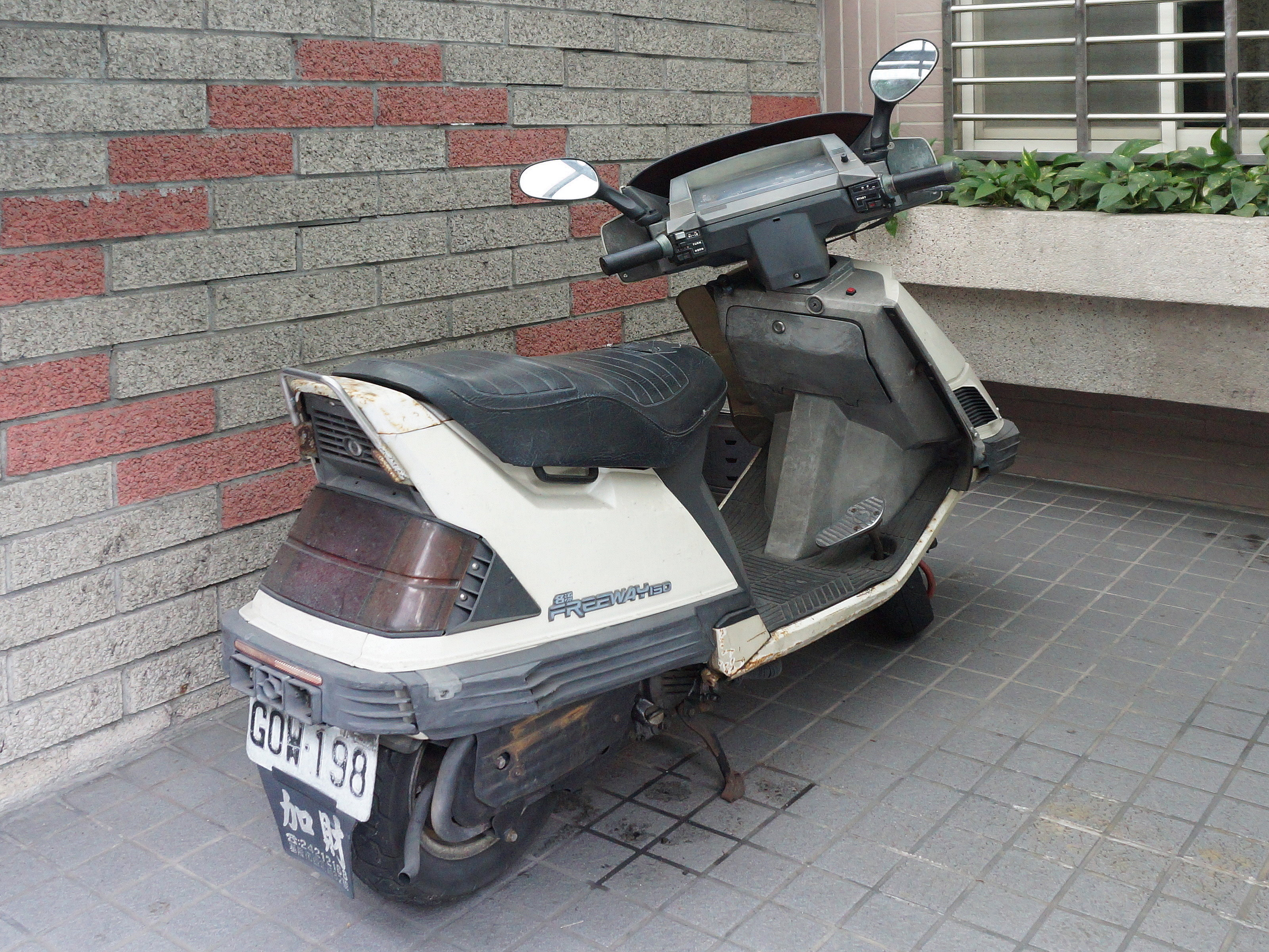 基隆市七堵區福一街，光陽名流150機車GOW-198。